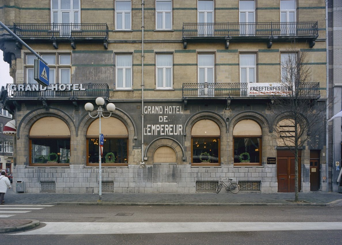 Hotel De Lempereur: Voorgevel, detail, deels gereinigd